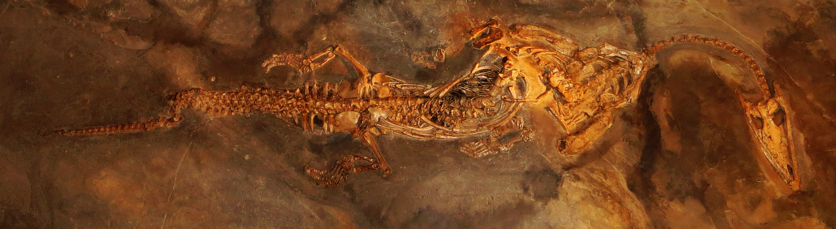 Fossil - Took the picture at Museum of Natural History Zurich